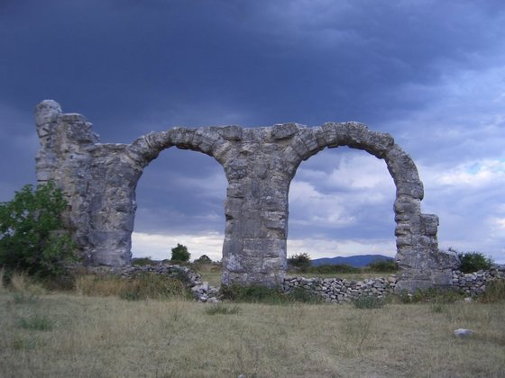 Logor Burnum, kod Knina